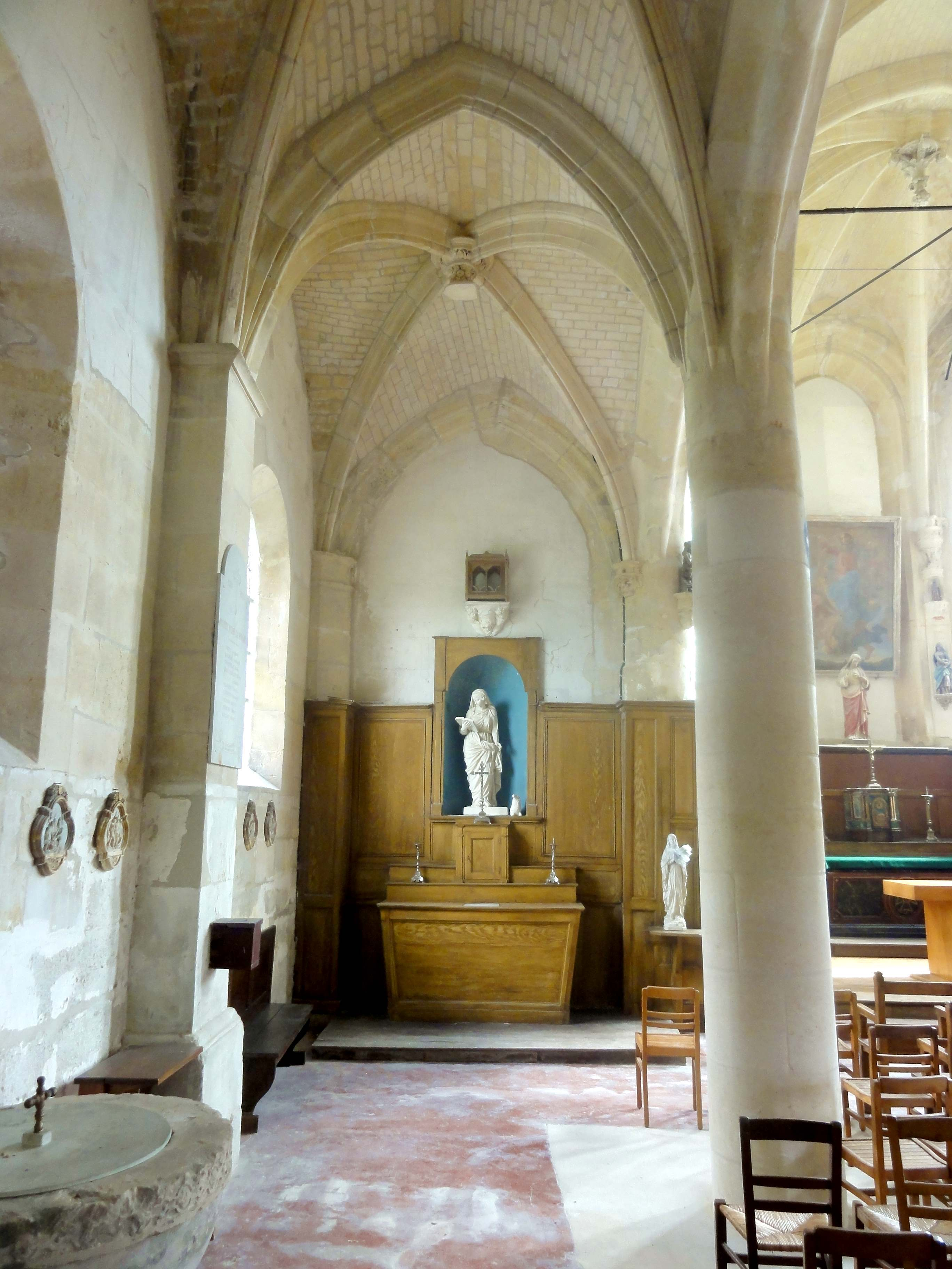 Bas-côté nord, vue vers l'est.